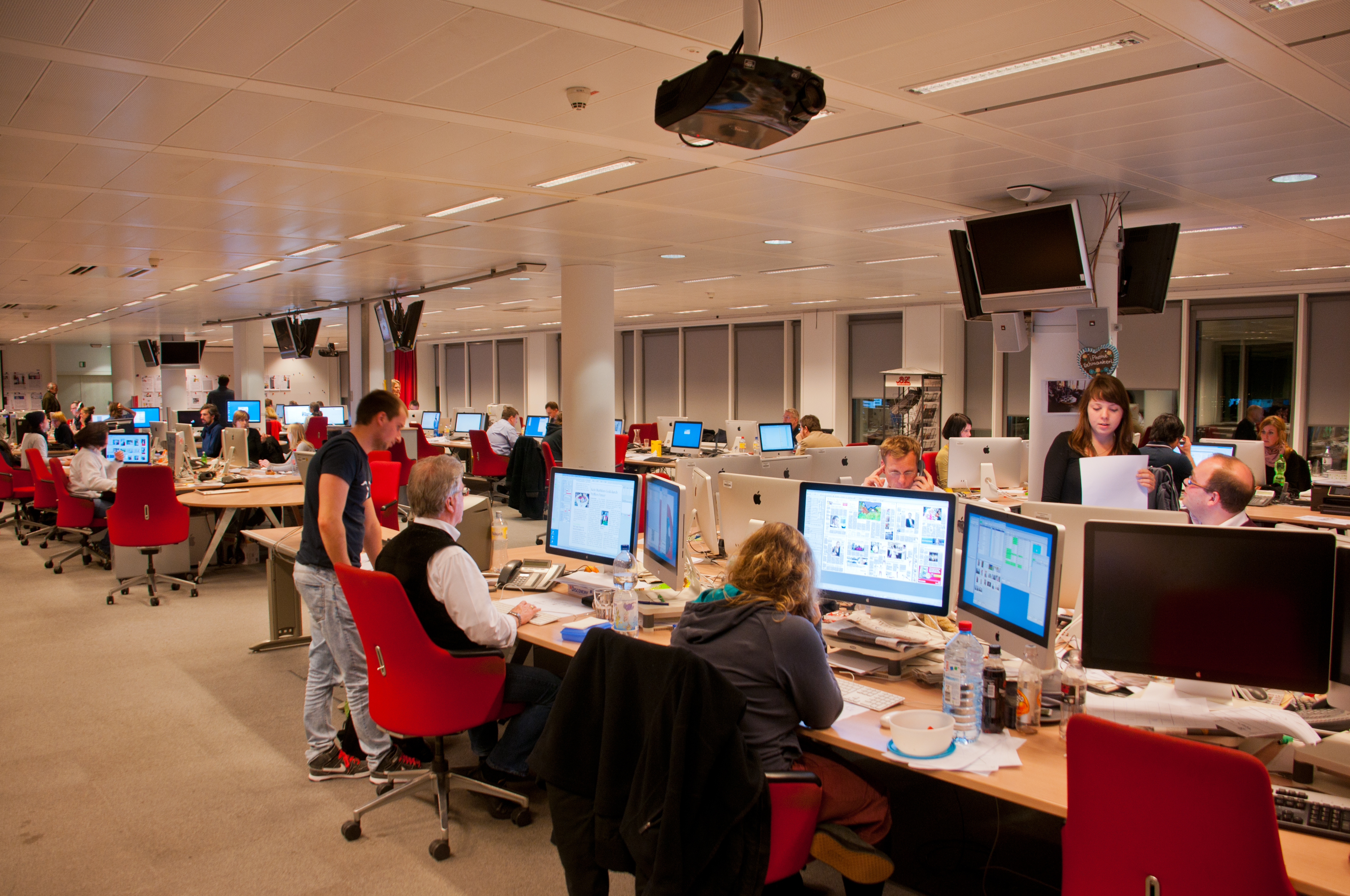 Wikipedia Stammtisch Berlin zu Besuch im Springer-Hochhaus. Redaktion, Zeitung, Verlag.